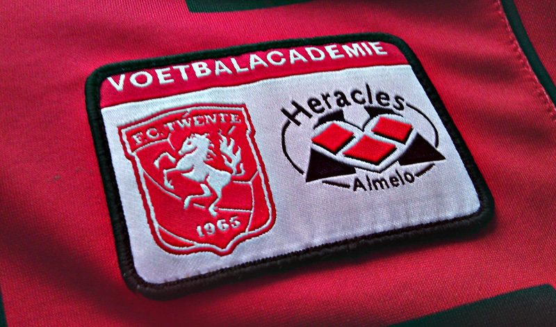 Foto van de voorkant van een oud Voetbalacademie FC Twente thuisshirt met het combinatie logo, genomen op 9 februari 2012